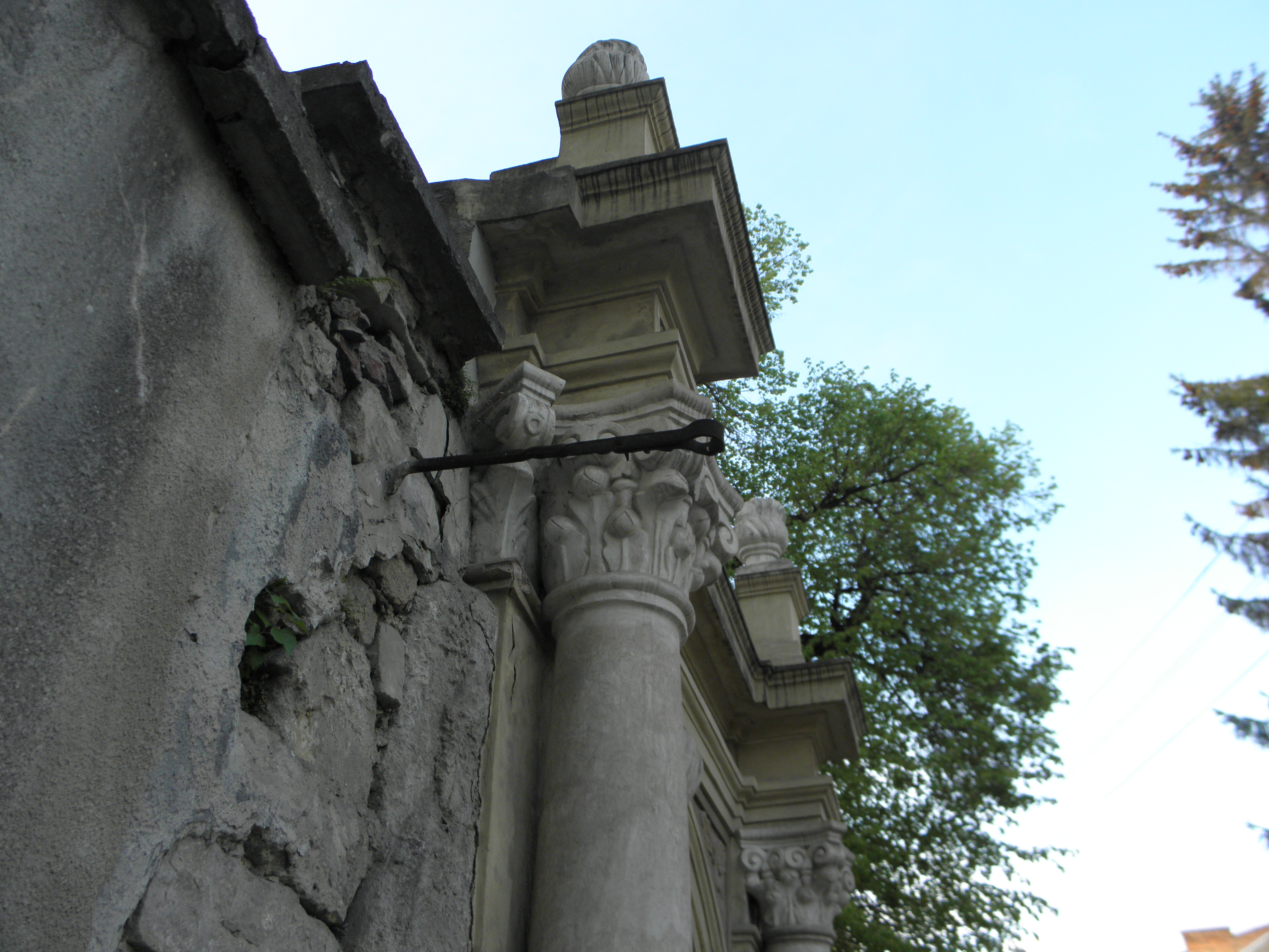 Тримач турецького ядра, (давній (нині бічний) вхід на подвір'я костелу Внебовзяття Пресвятої Діви Марії (Матері Божої Шкаплірної, у радянських та пострадянських джерелах - костел Успіння Діви Марії), Бучач, 2016